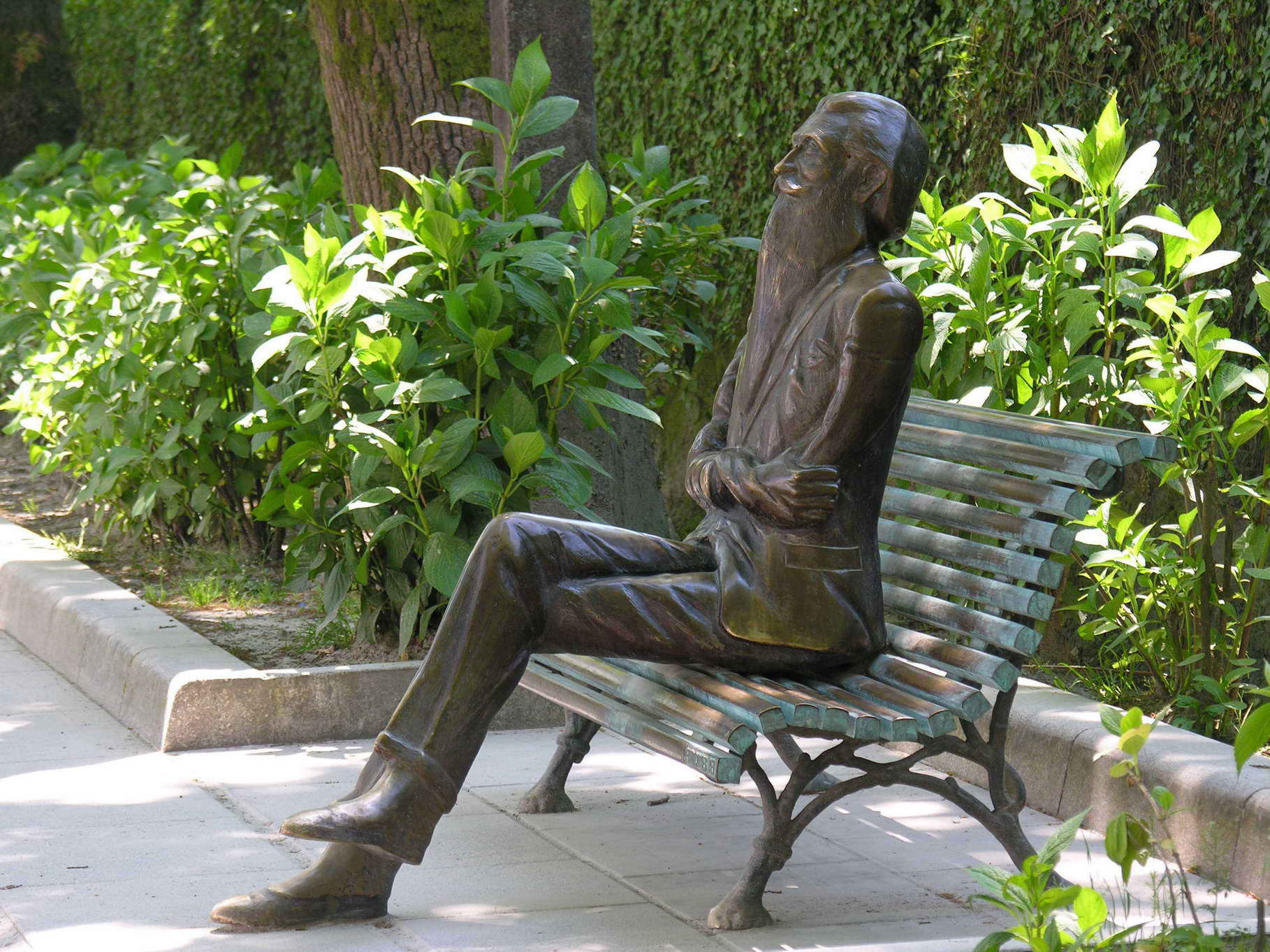 Estatua de Valle Inclán na Alameda de Santiago de Compostela realizada por César Lombera Publish by= Luis Miguel Bugallo Sánchez. Self made